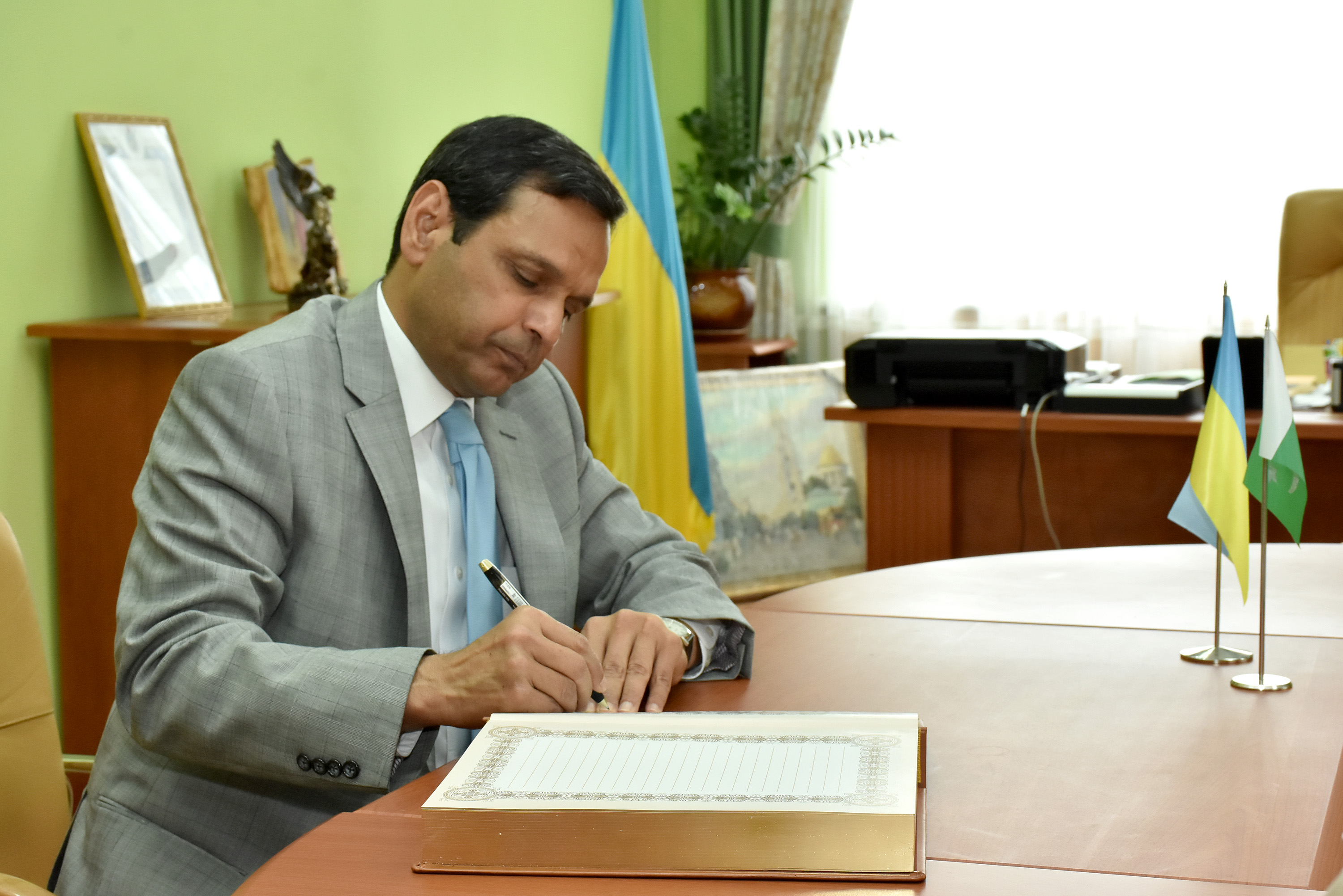 Надзвичайний і Повноважний Посол Пакистану в Україні Атар Аббас пише вітання в Почесну книгу гостей з нагоди 60-річчя Тернопільського державного медичного університету імені І. Я. Горбачевського.